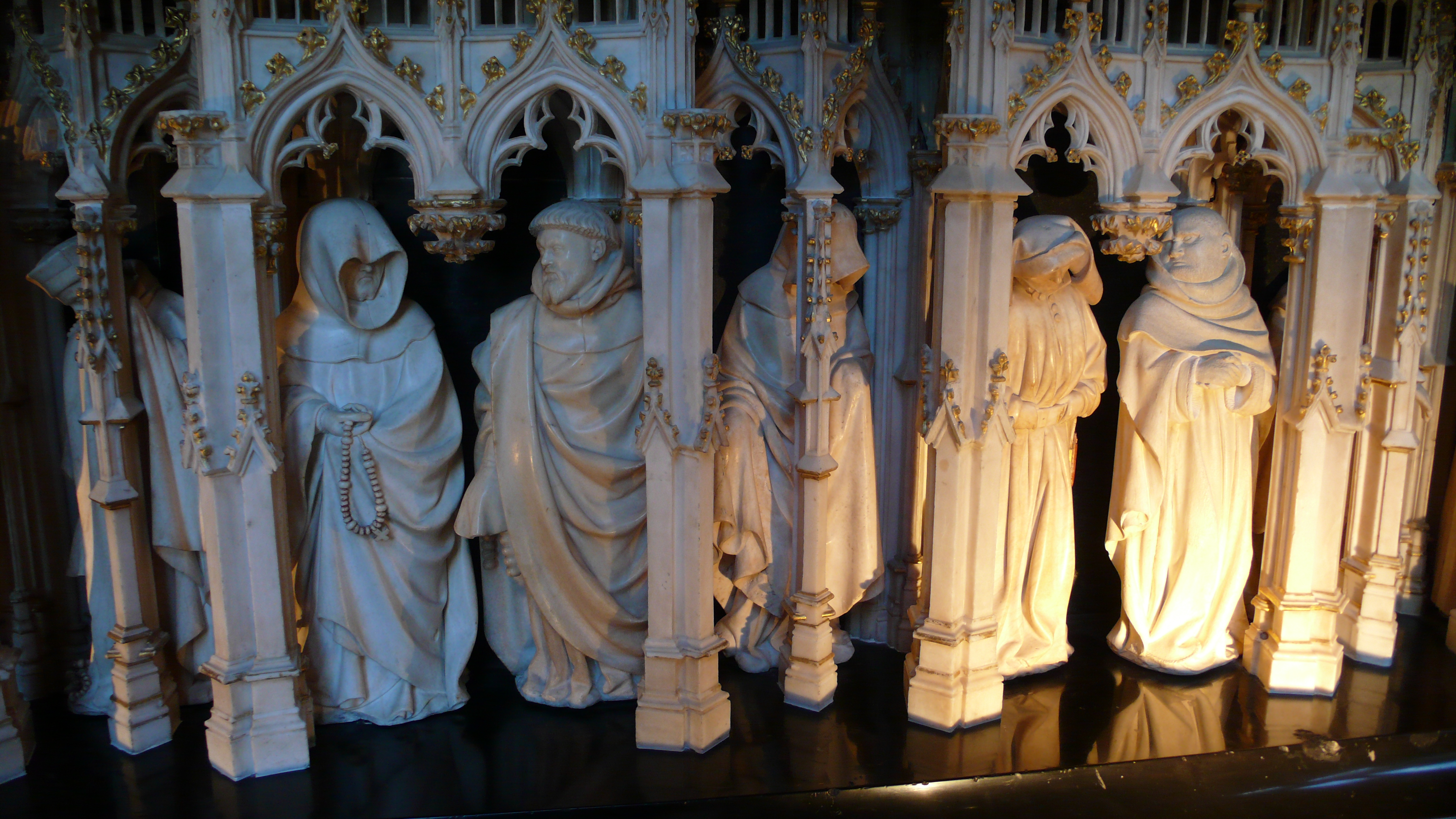 Tombeau du Duc Philippe le Hardi au Palais des Ducs de Bourgogne à Dijon, Detail